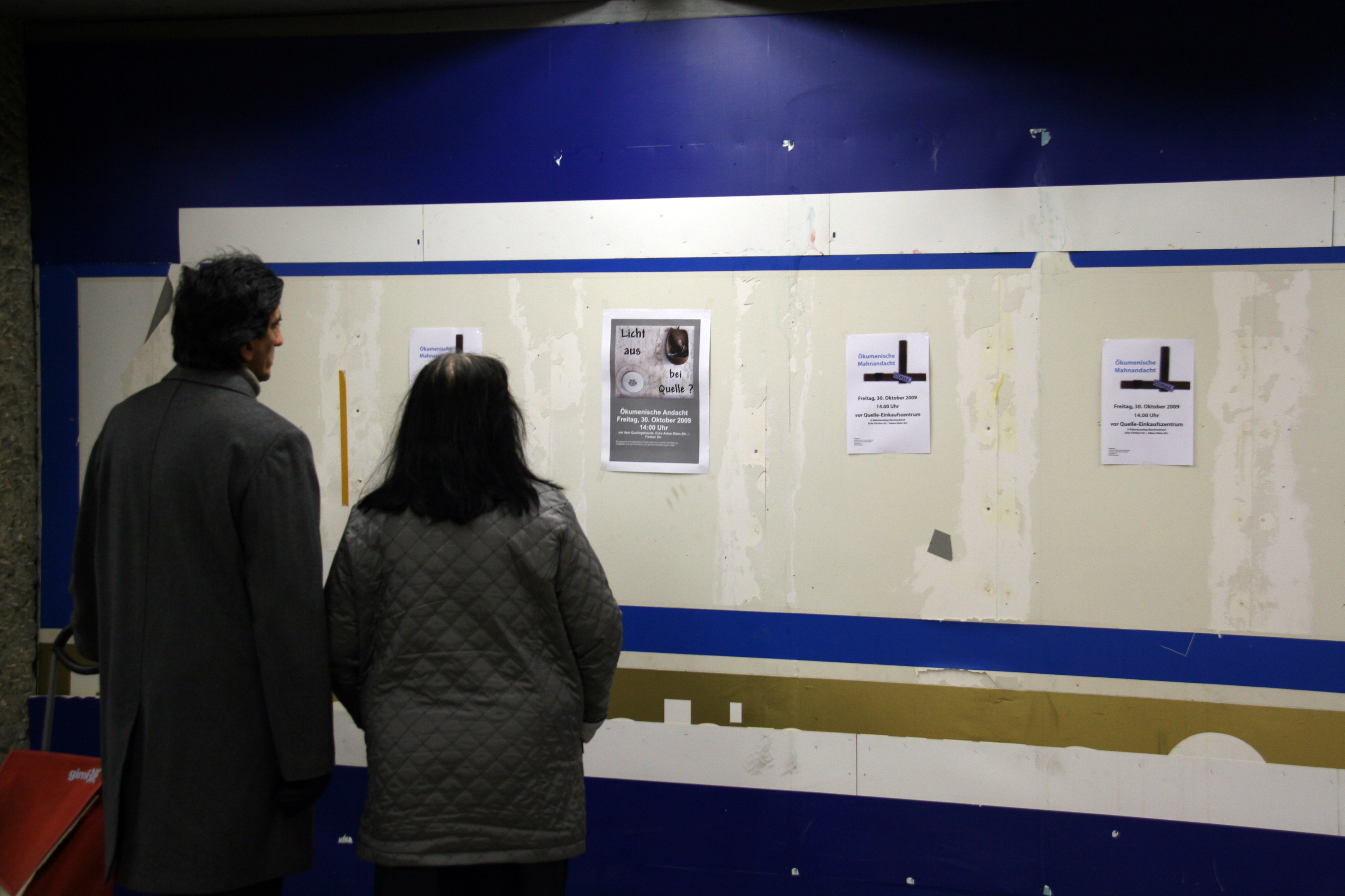 Protestaktionen und Gottesdienste der Beschäftigten zur Schließung des Quelle Versandhauses in Nürnberg an der Fürther Straße Ende Oktober 2009